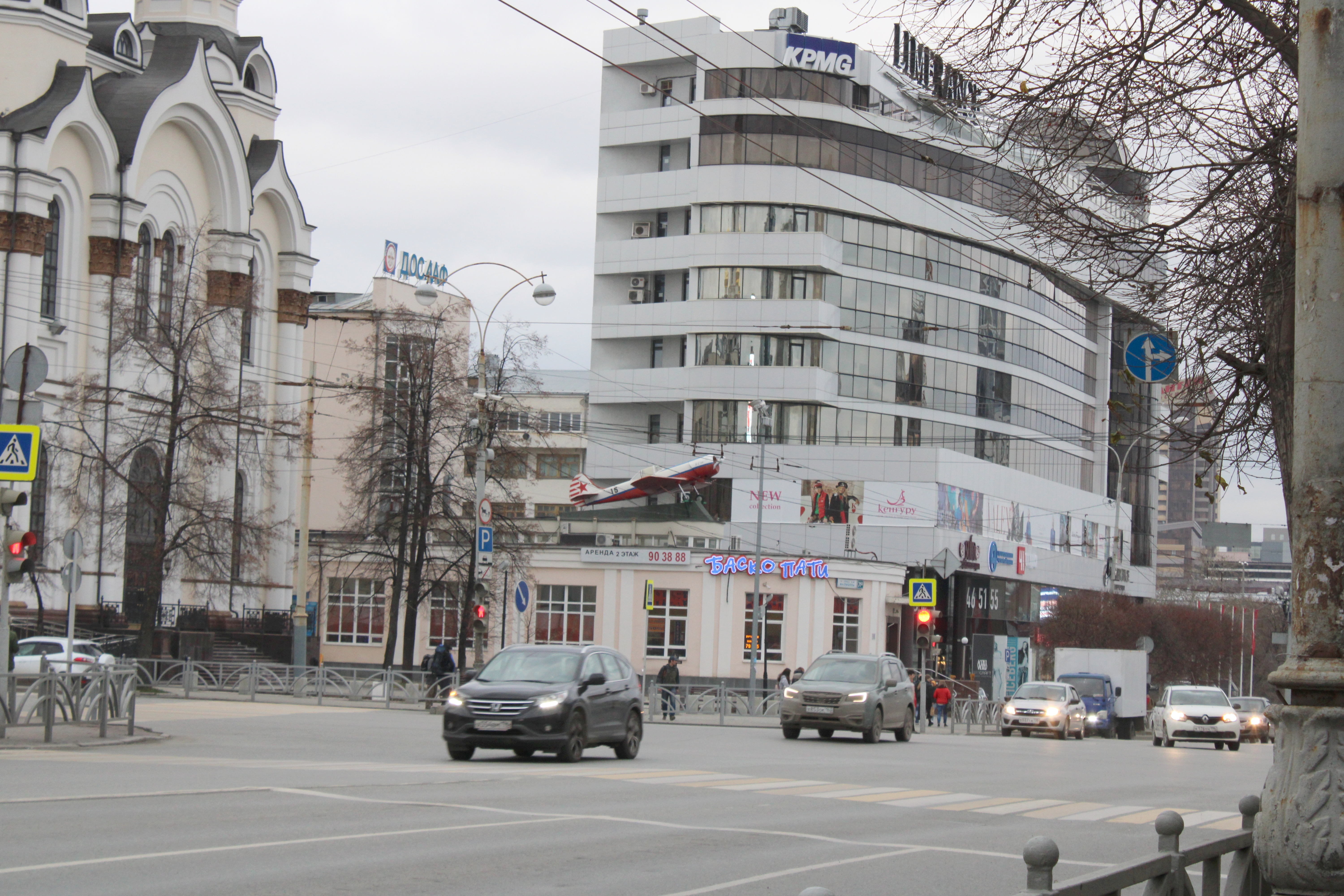 Самолёт Як-50 на крыше дома Обороны (Екатеринбург, улица Малышева, 31д)